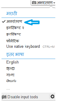 मराठी लेखन निवड सहाय्य